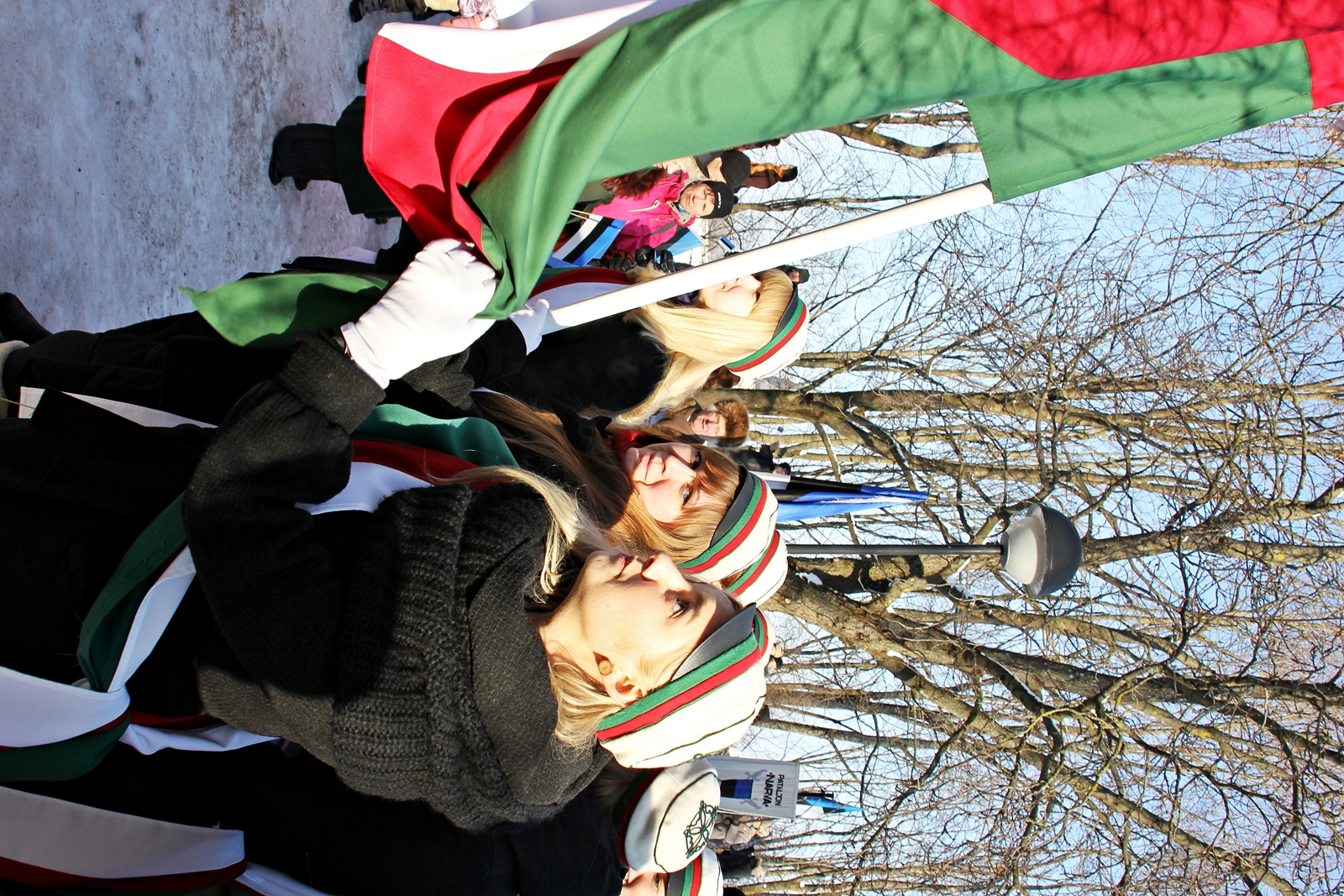 Vabariigi 95. aastapäeva tähistamine Tartu Tähetorni juures. 24-02-2013. TÜ tudengid.